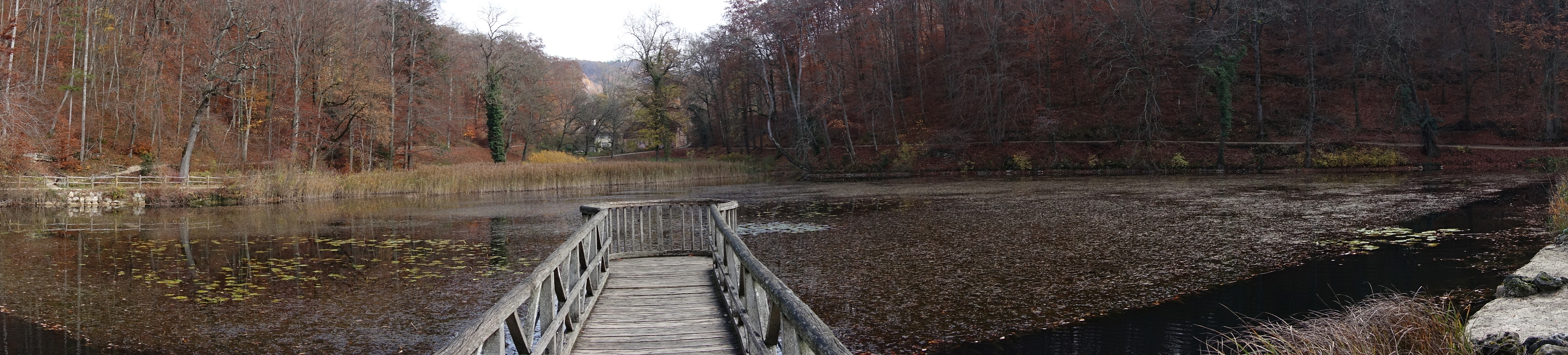 Früher hiess der mittlere Weiher „Lac du Tempé“, ein Name, der auf das griechische Tempé – Tal zwischen Olymp und Ossagebirge verweist, ein landschaftlich ausserordentlich schöner Einschnitt, dem im Apollon – Kult eine wichtige Rolle zukam. Früher konnten Besucher ihn mittels Barke überqueren